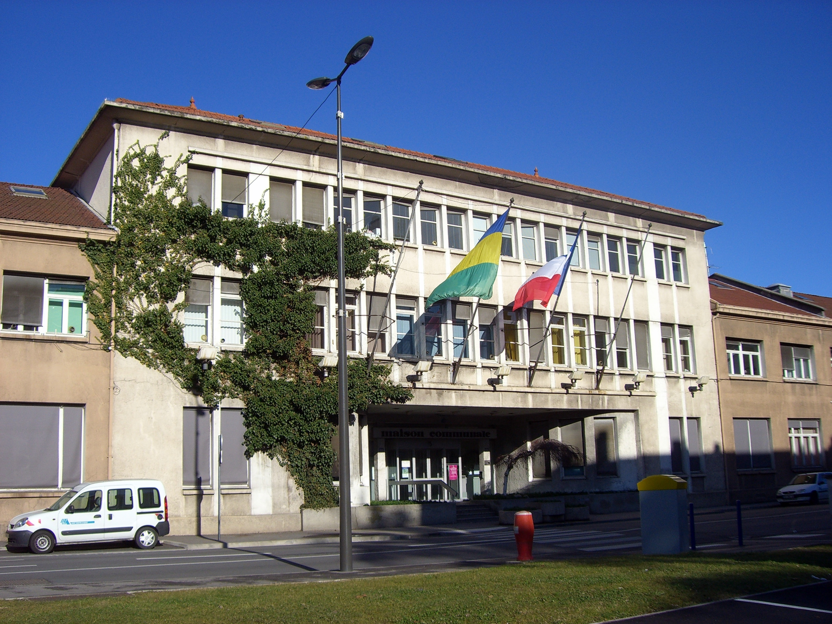 La Maison Communale de Saint-Martin-d'Hères.